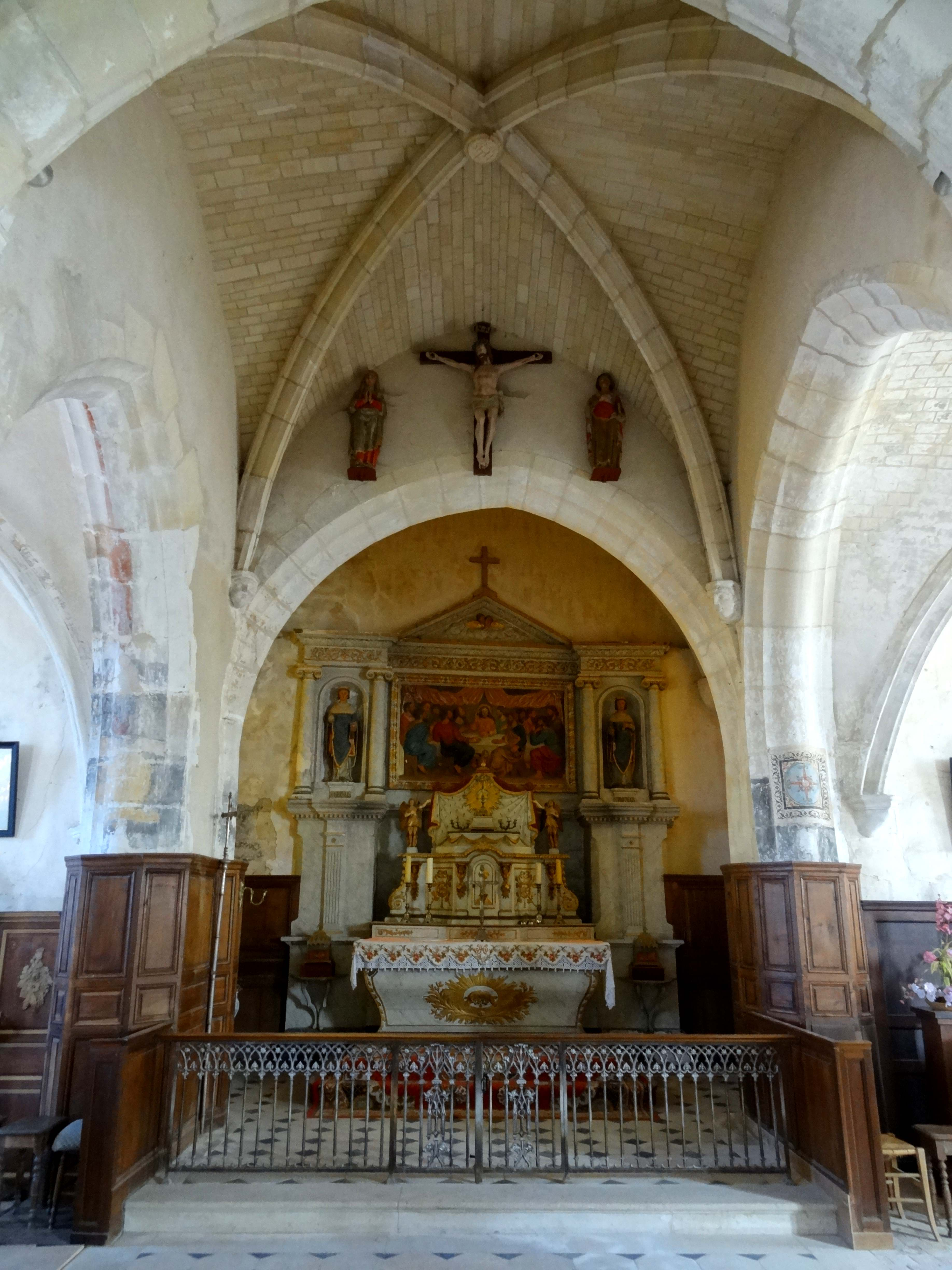 Intérieur de l'église - voir titre.